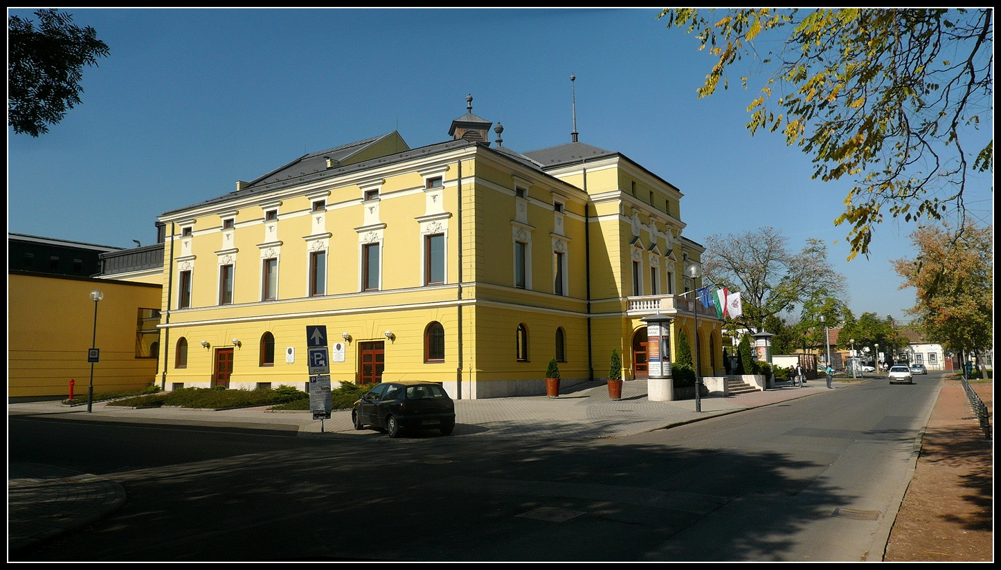 Színház